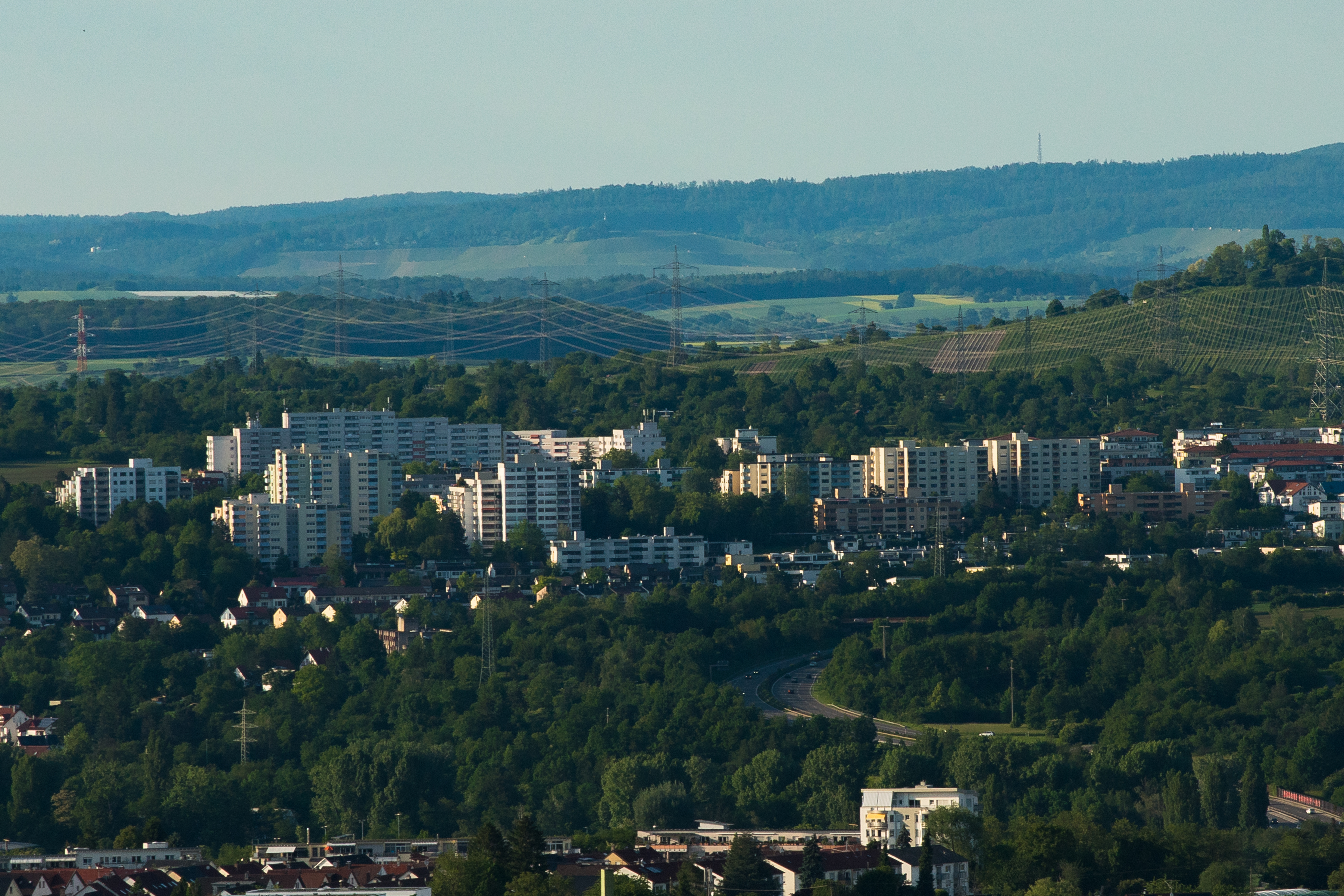 Wohngebiet "Korber Höhe" in Waiblingen.